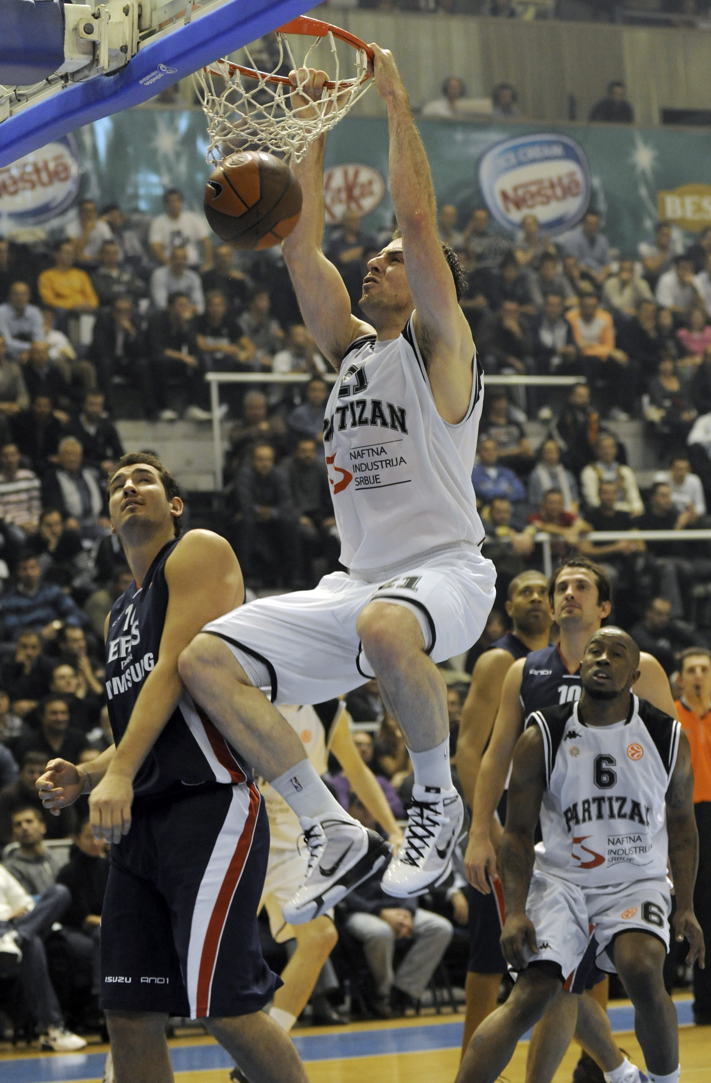 _DSC7975